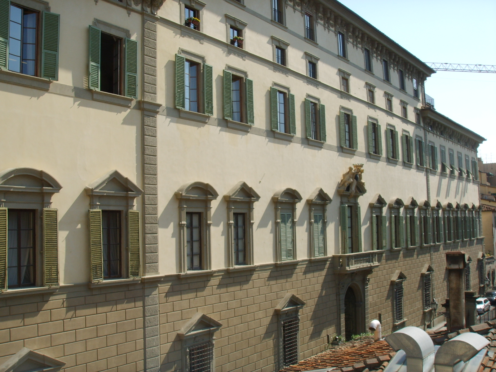 Palazzo_di_Gino_Capponi in Florence